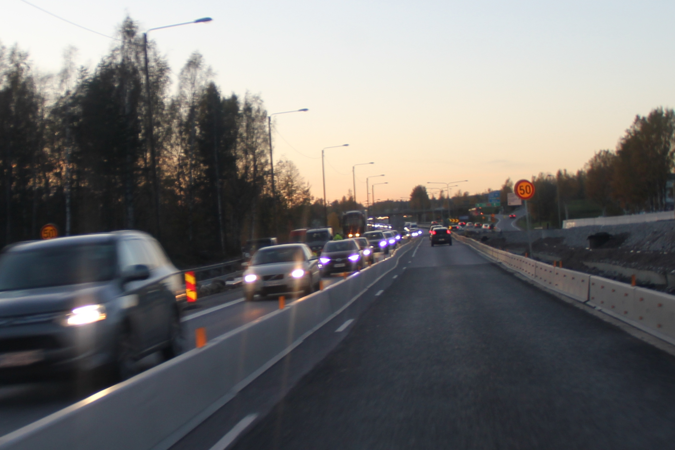 Valtatie 1 Espoon Kirkkojärvellä 15.10.2017 klo 19.15. Tulvahuipun mentyä ohi korjaustyön alla olevista kaistoista on edelleen käytössä vain yksi suuntaansa.